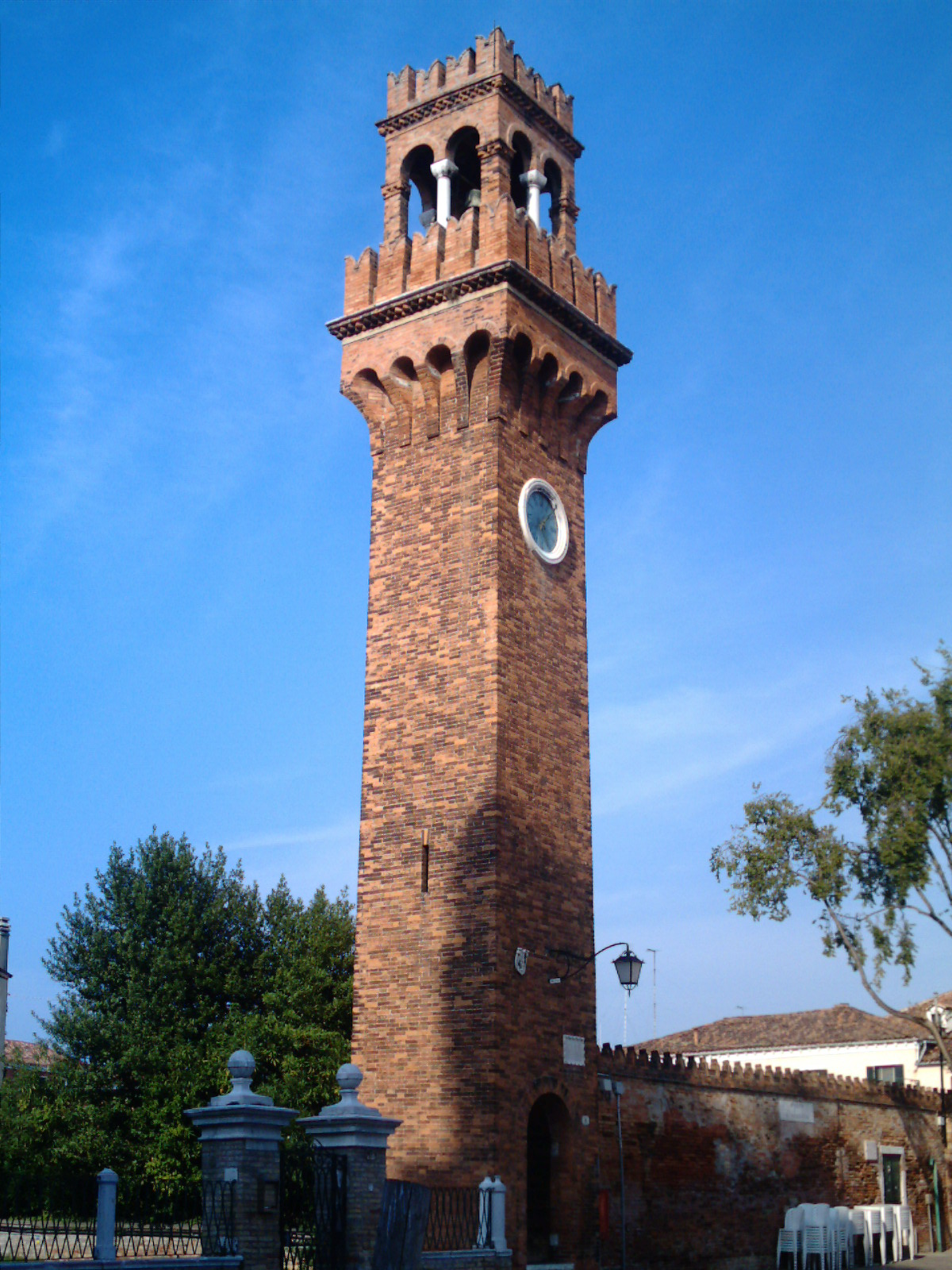 torre di murano